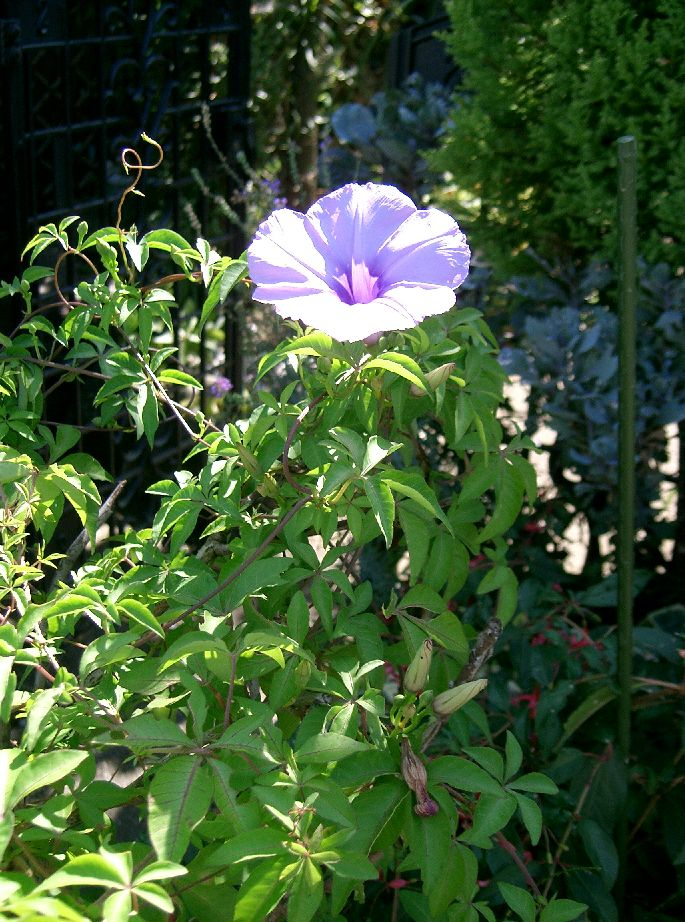 Ipomoea cairica